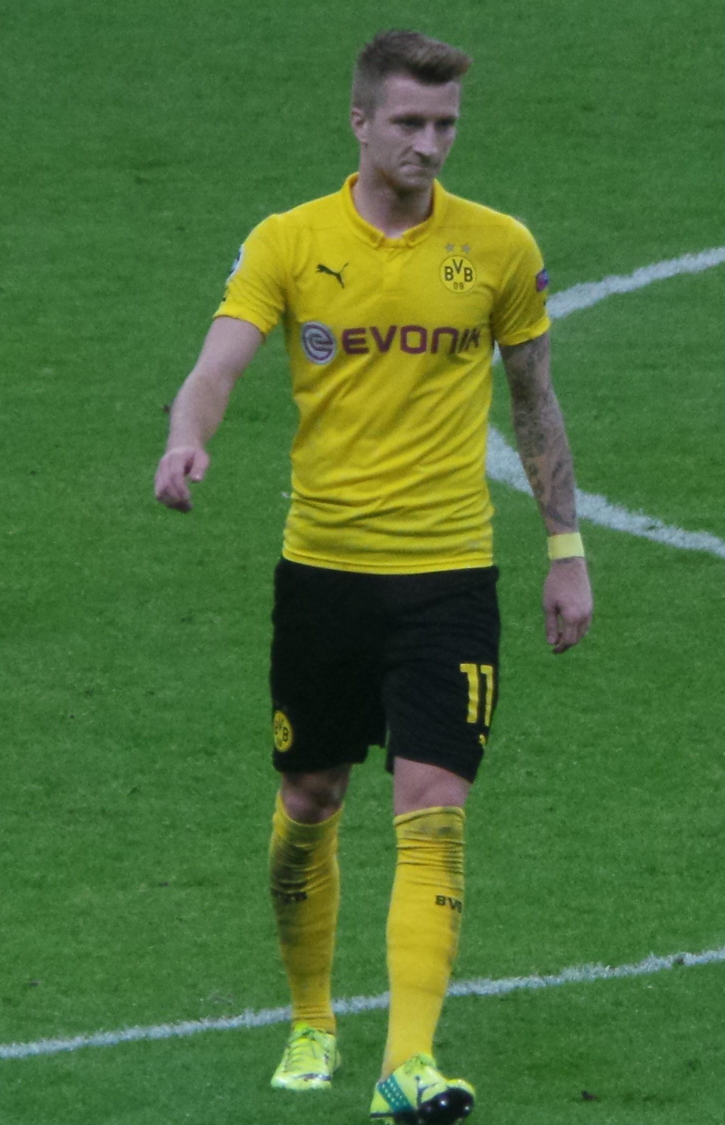 Marco Reus'14